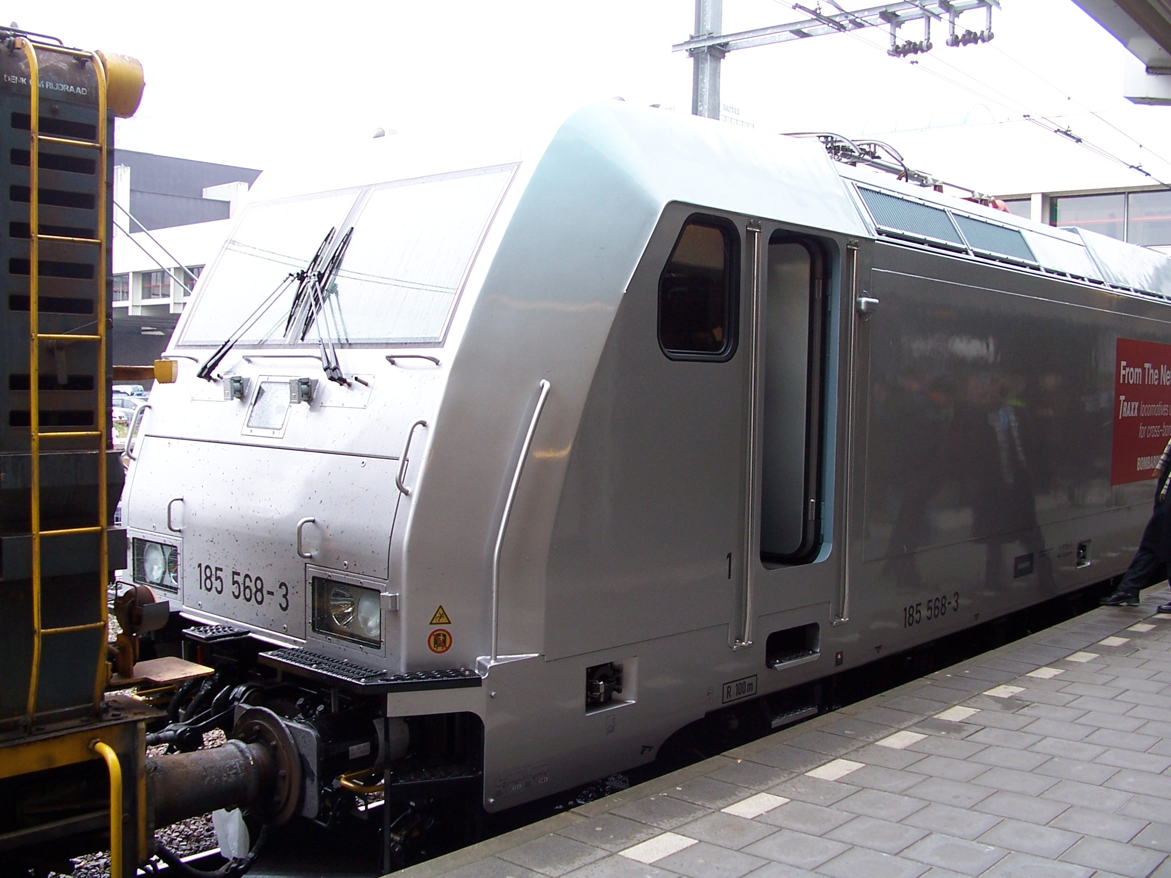 Bombardier_Traxx in Utrecht (Netherlands)